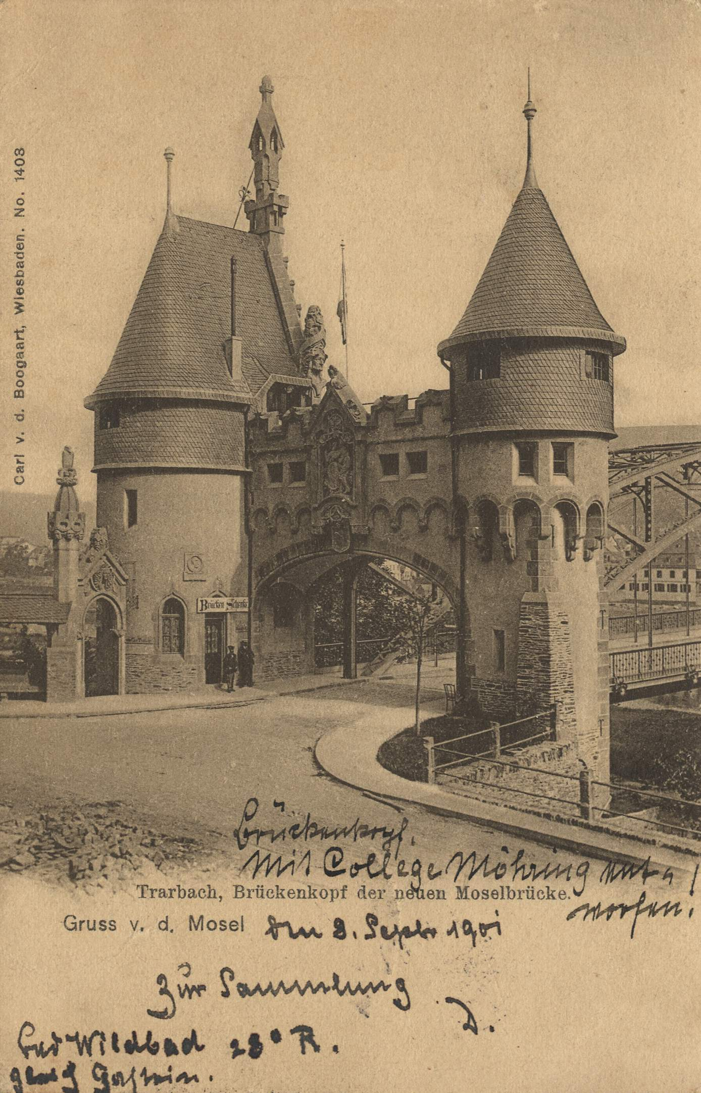 Trarbach, Brückenkopf der neuen Moselbrücke